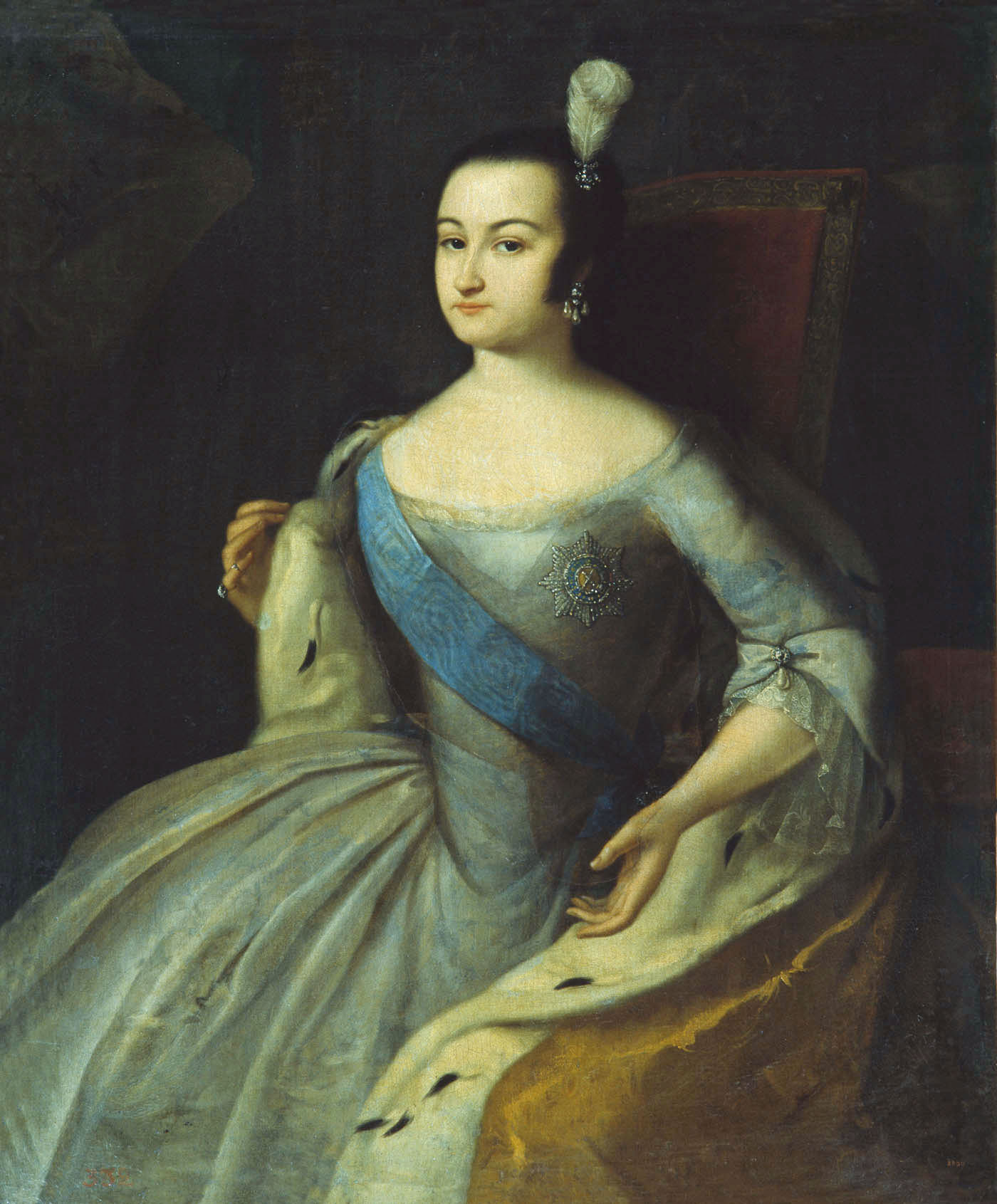 Изображена с орденом святого Андрея Первозванного (лента и звезда; 1740).